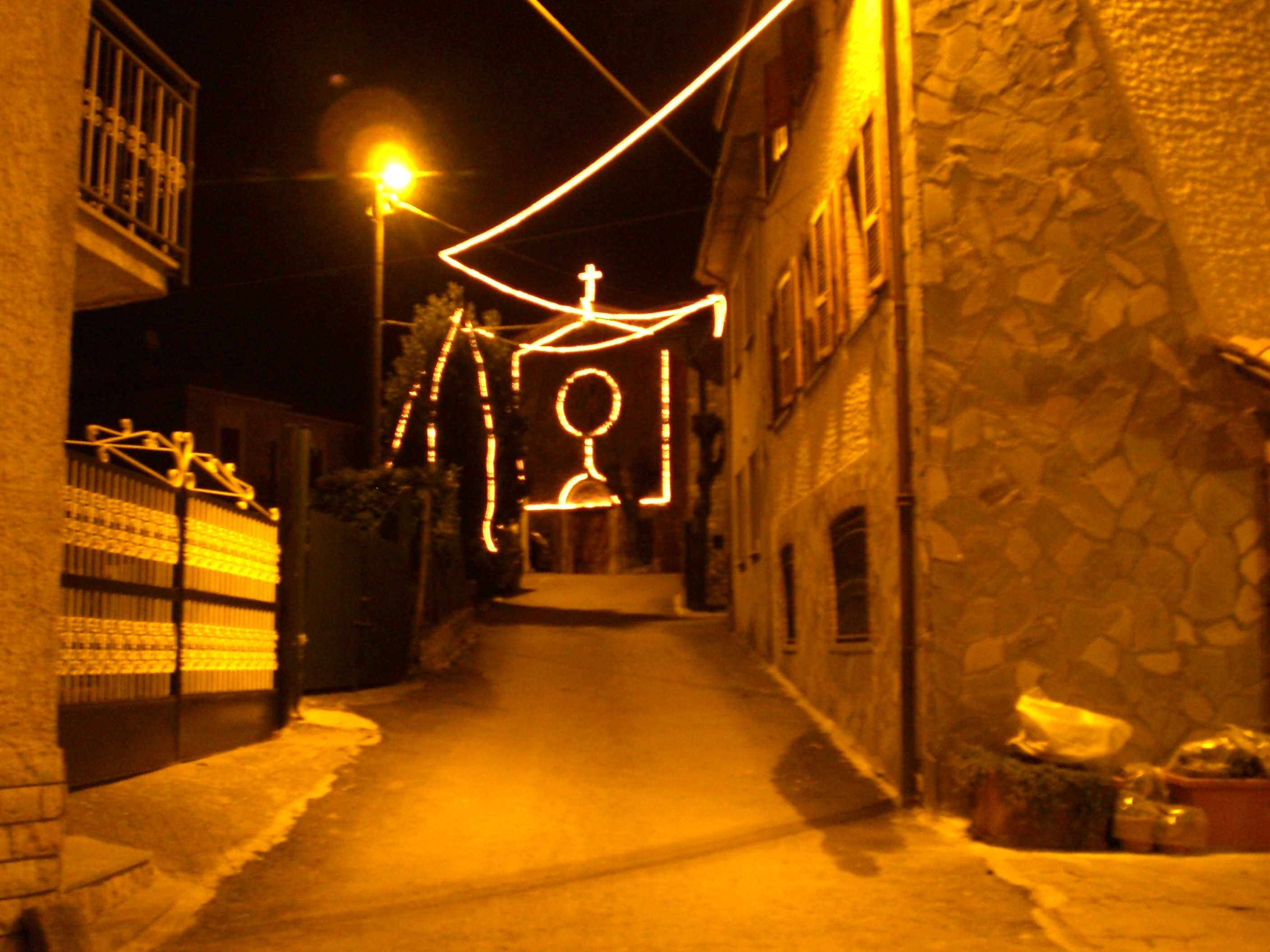 Cicogni, via della Chiesa illuminata durante le feste natalizie. Sullo sfondo, la facciata della Chiesa parrocchiale